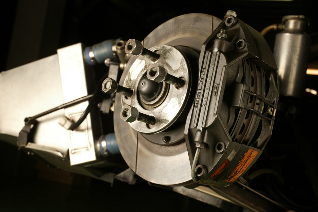 Disk brake